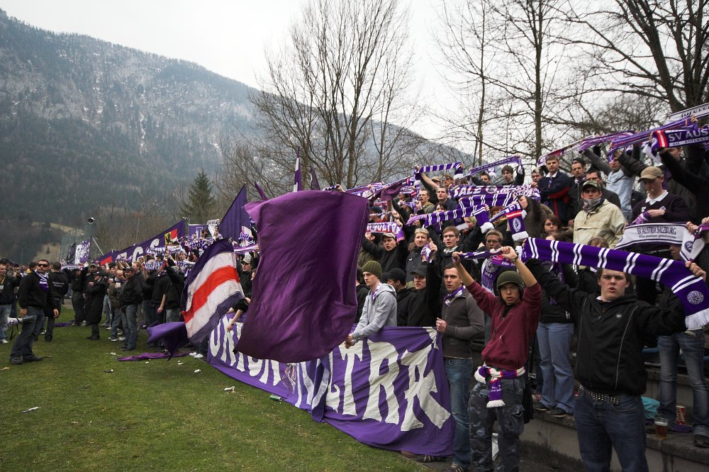 Fans der neugegründeten Austria Salzburg bei einem Auswärtsspiel in Unken